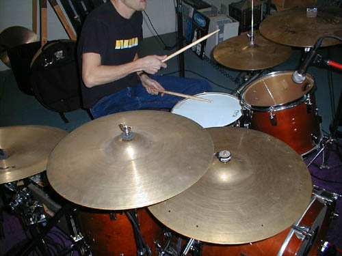 Batería. Srpskohrvatski / српскохрватски: Činele. ייִדיש: פויקער.Brian on the Tama kit